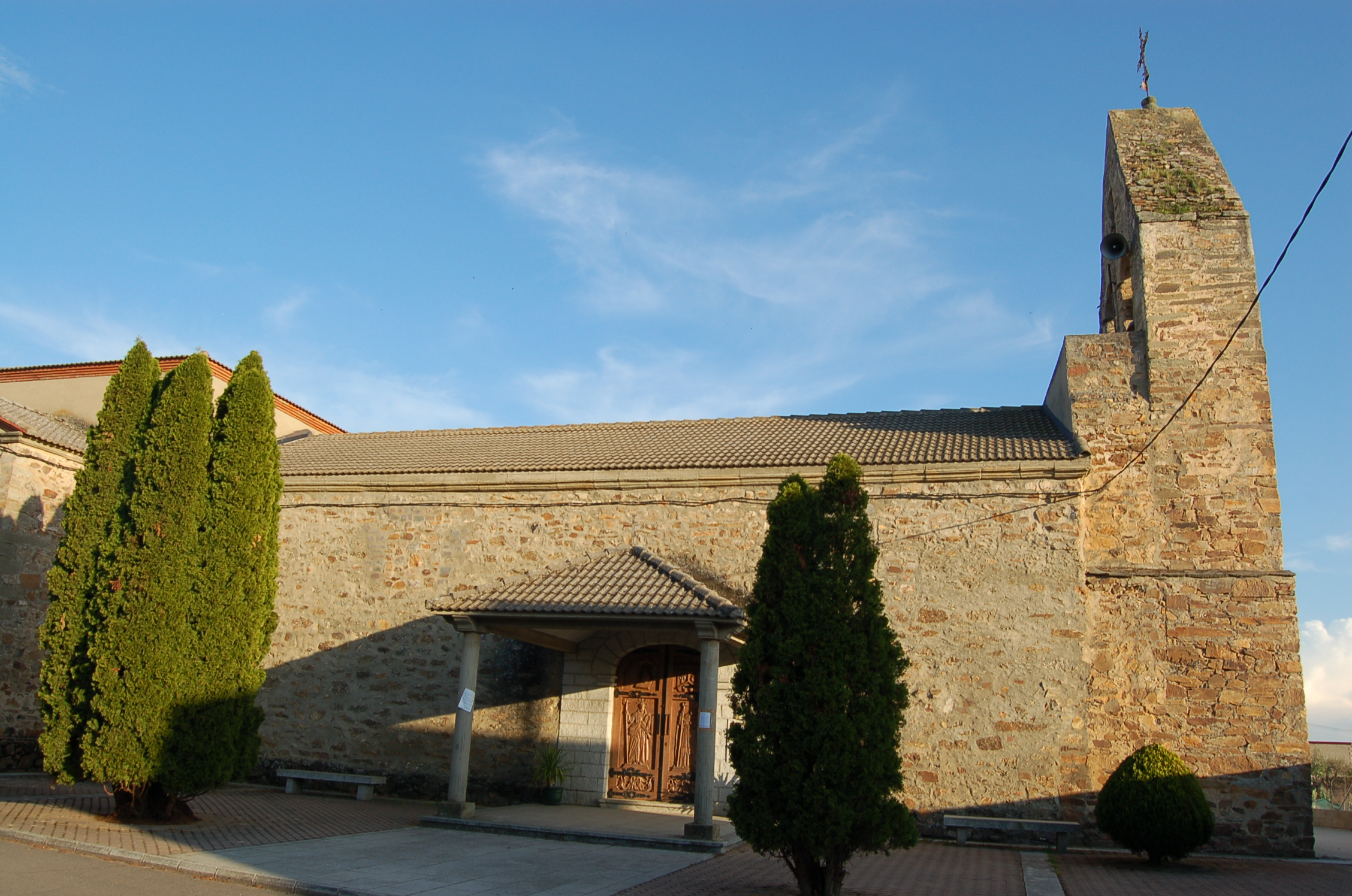 Igrexa de Santa Croya de Tera